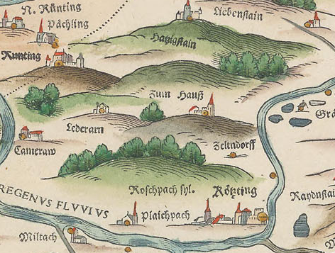 Philipp Apian - Bairische Landtafeln von 1568 - Ausschnitt Kötzting